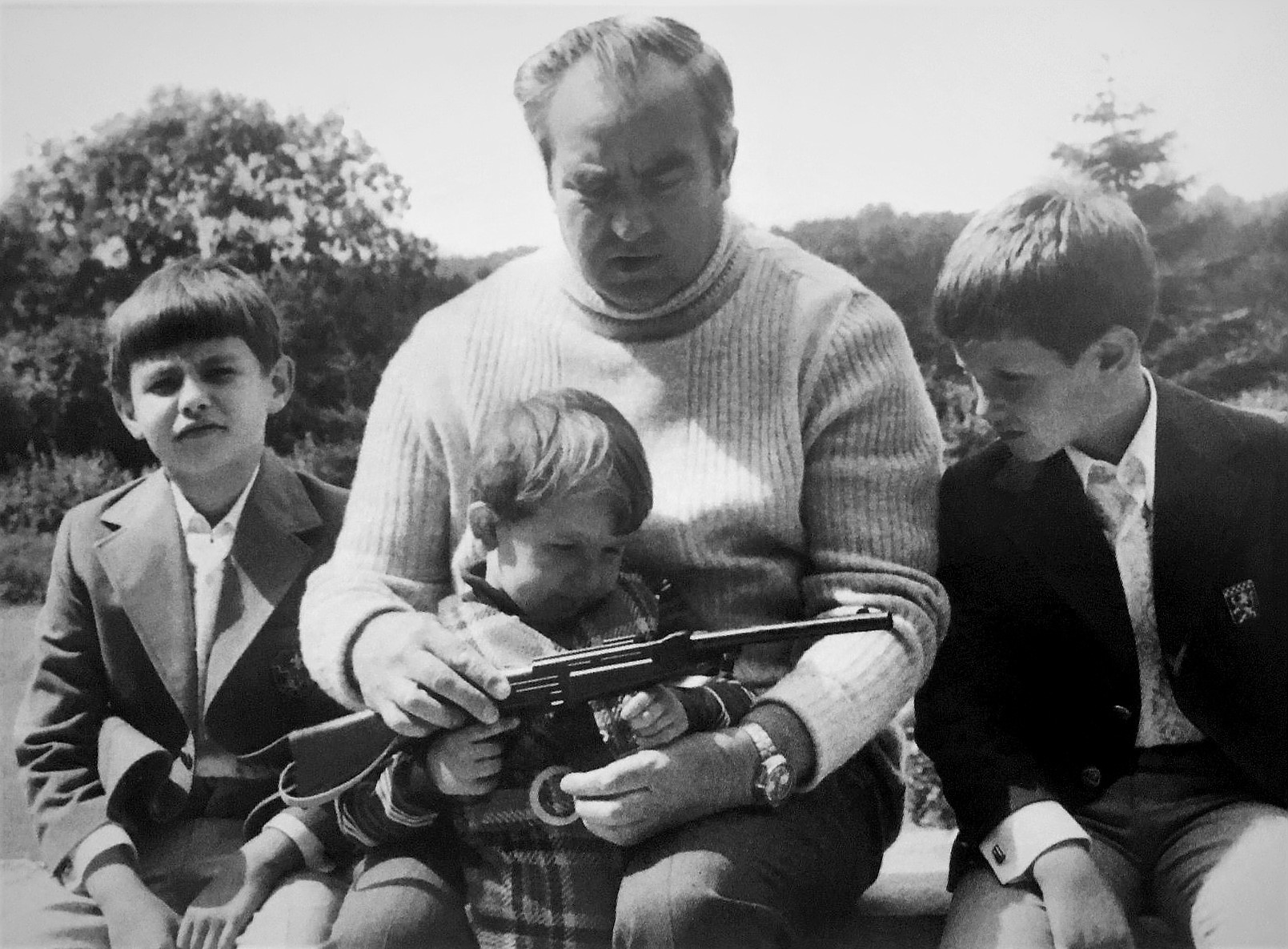 Виктор Георгиевич Куликов с внуками на отдыхе в Германии. Слева направо внуки: Сергей, Николай и Алексей